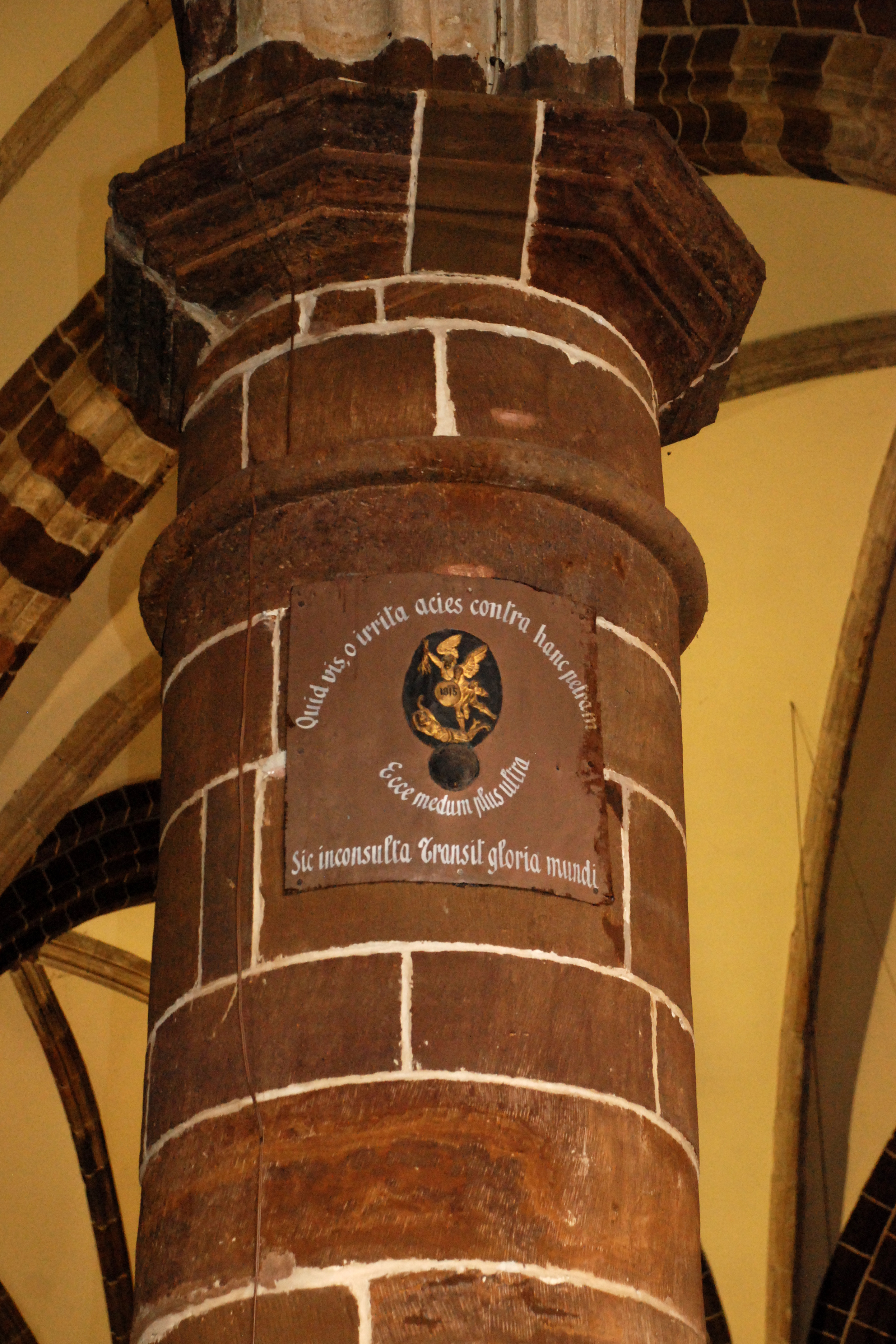 Belgique - Brabant wallon - Wavre - Église Saint-Jean-Baptiste - Boulet de canon de la bataille de Wavre (18 juin 1815) incrusté dans un pilier